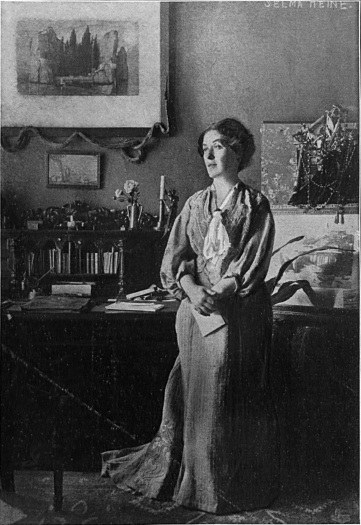 Anselma Heine, auch: Selma Heine, Pseudonyme: Anselm Heine, Feodor Helm, (1855-1930), deutsche Schriftstellerin.